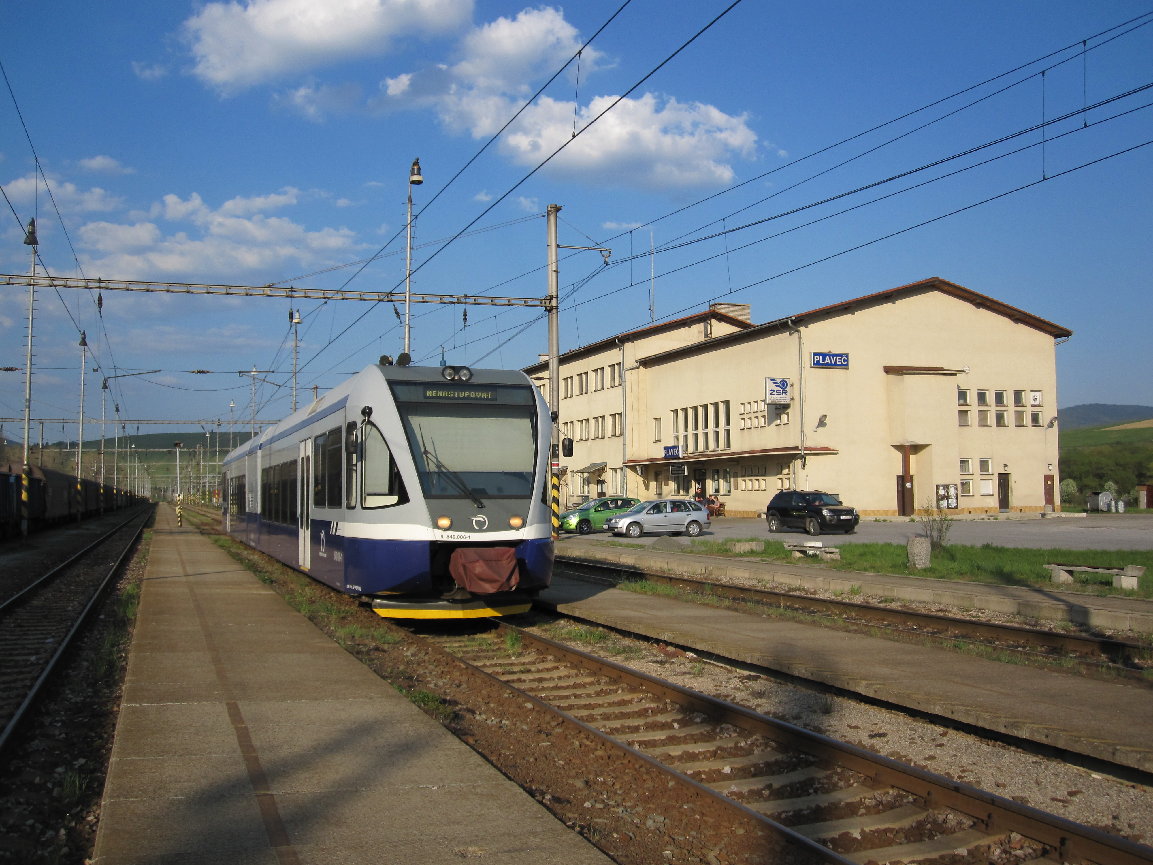 Motorová jednotka 840.006 Železniční společnosti Slovensko, Plaveč